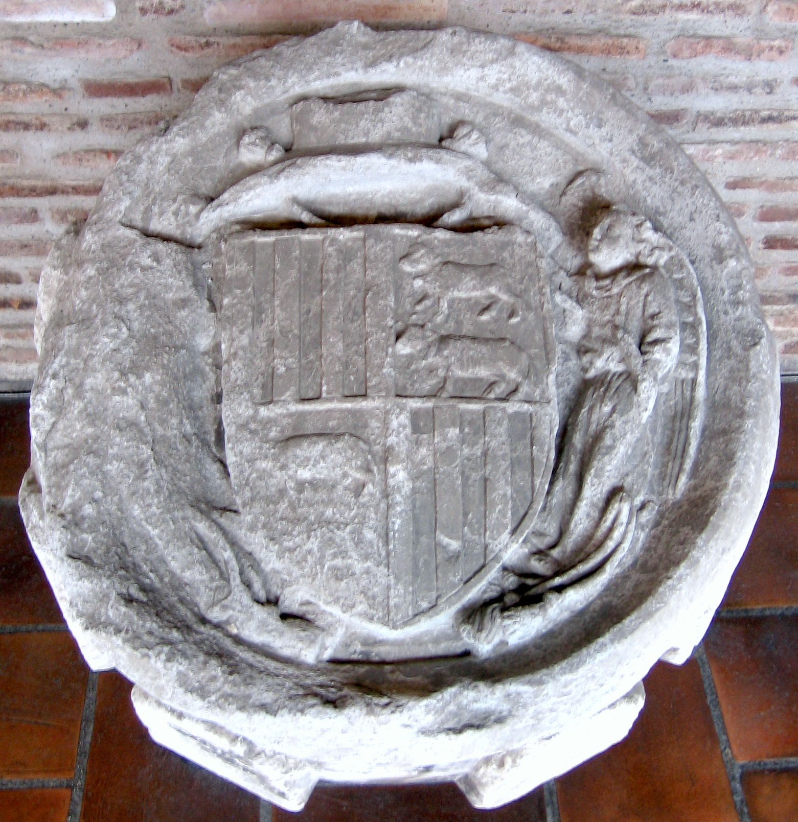 Clef de voute du collège de Foix, portant les armes du cardinal Pierre de Foix. Musée des Augustins, Toulouse